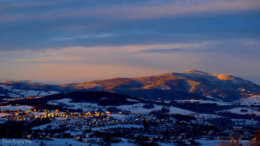 Mogielica z Pasma Łósosinskiego